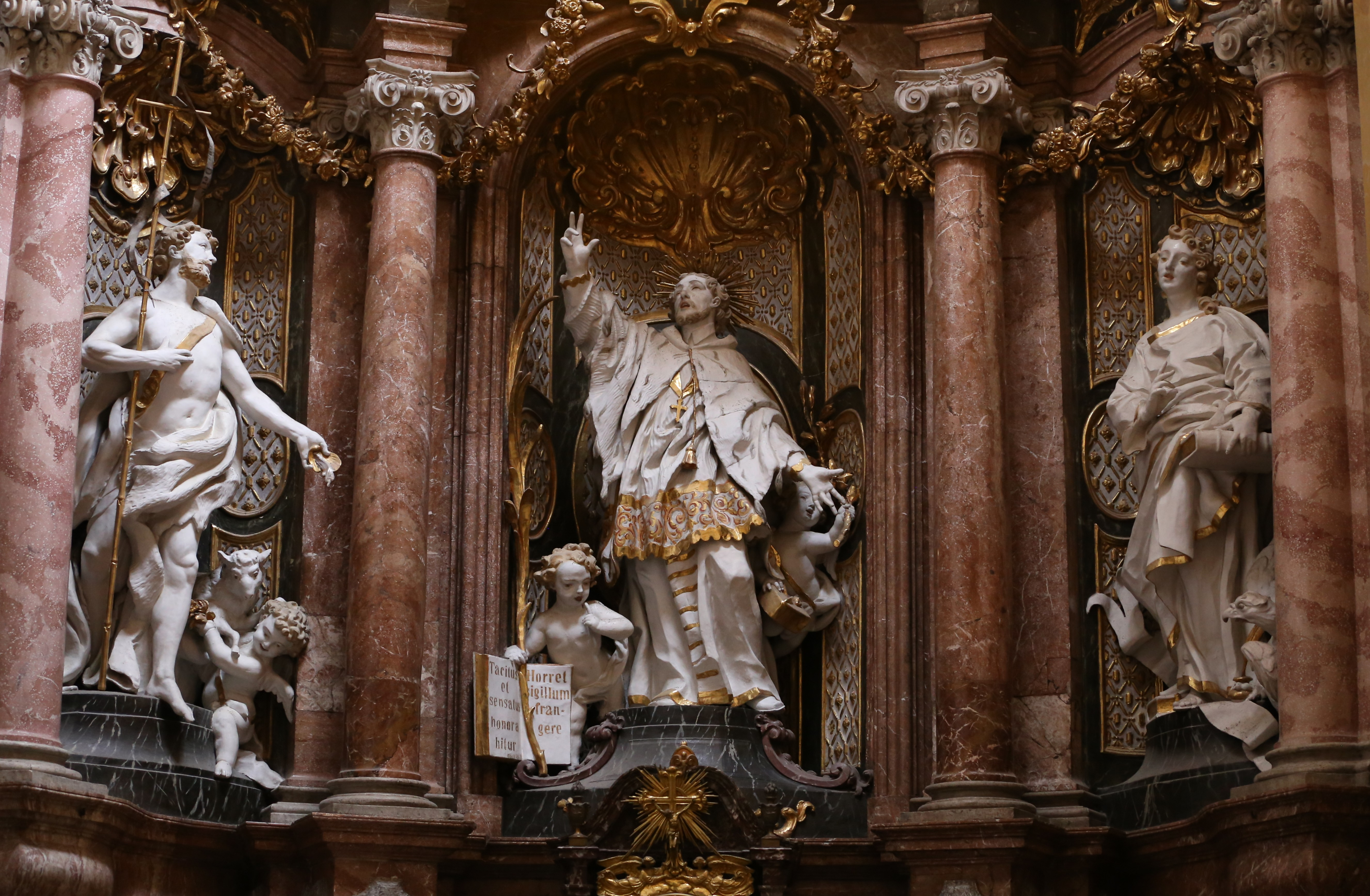 Domkirche Mariä Geburt und St. Korbinian, Freising, Johann-Nepomuk-Kapelle (Egid Quirin Asam). Johannes-Nepomuk-Statue (1737/1738), polychrom, begleitet von Johannes dem Täufer und Johannes dem Evangelisten.